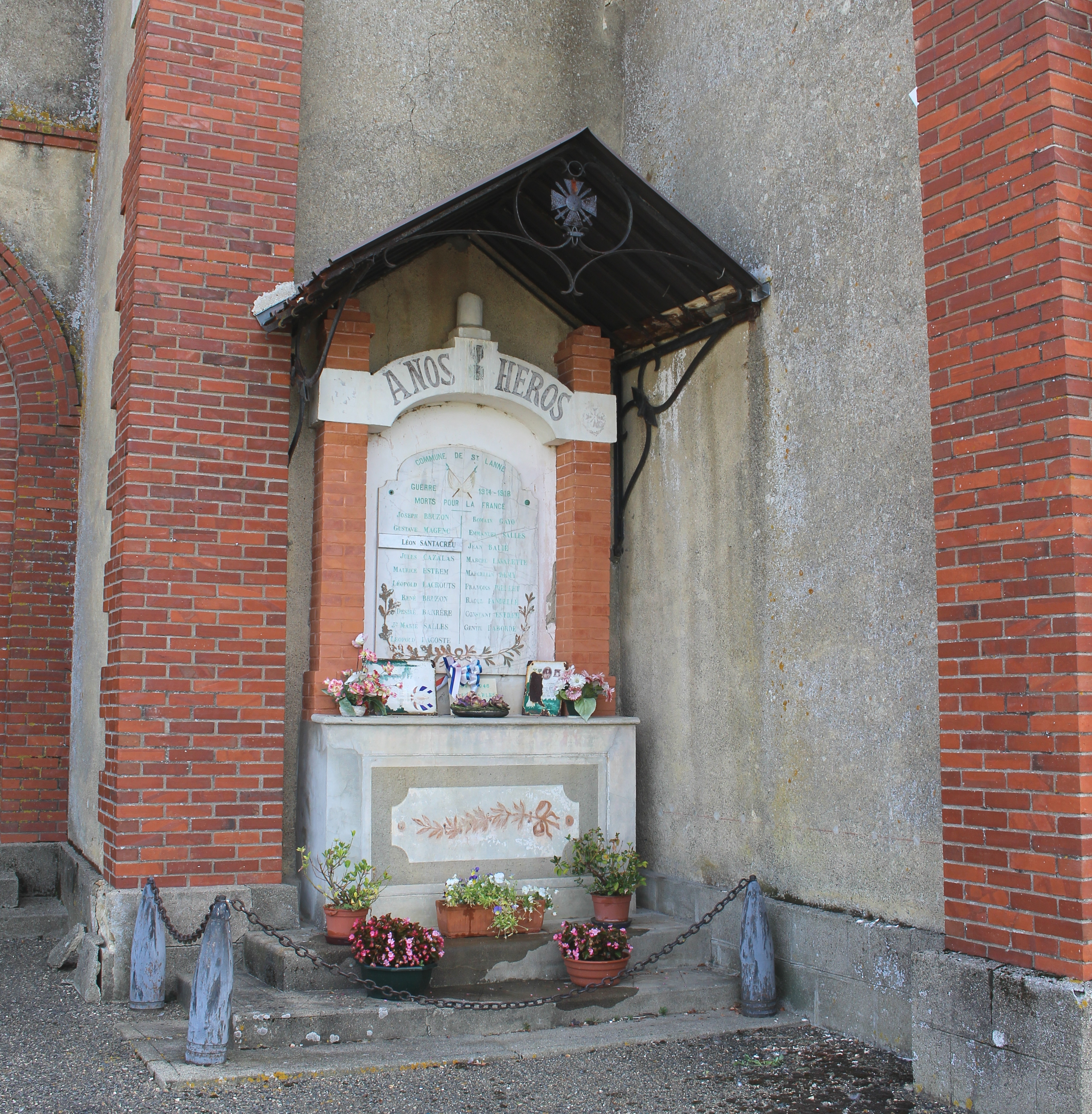 Monument aux morts de Saint-Lanne (Hautes-Pyrénées)